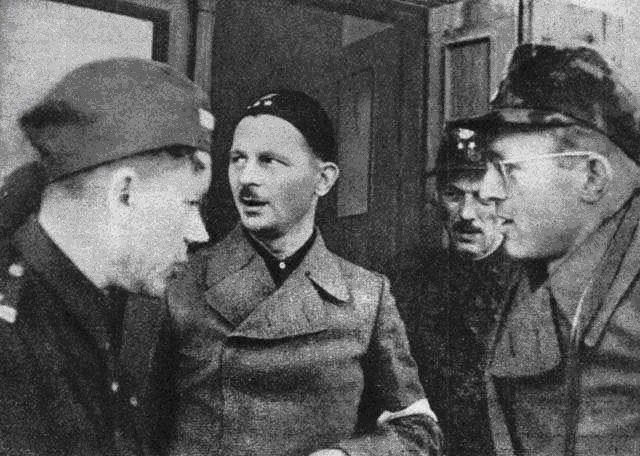 Wacław Chojna Powstanie Warszawskie - środek, płk Jan Mazurkiewicz po lewej, por Stanisław Wierzyński z prawej